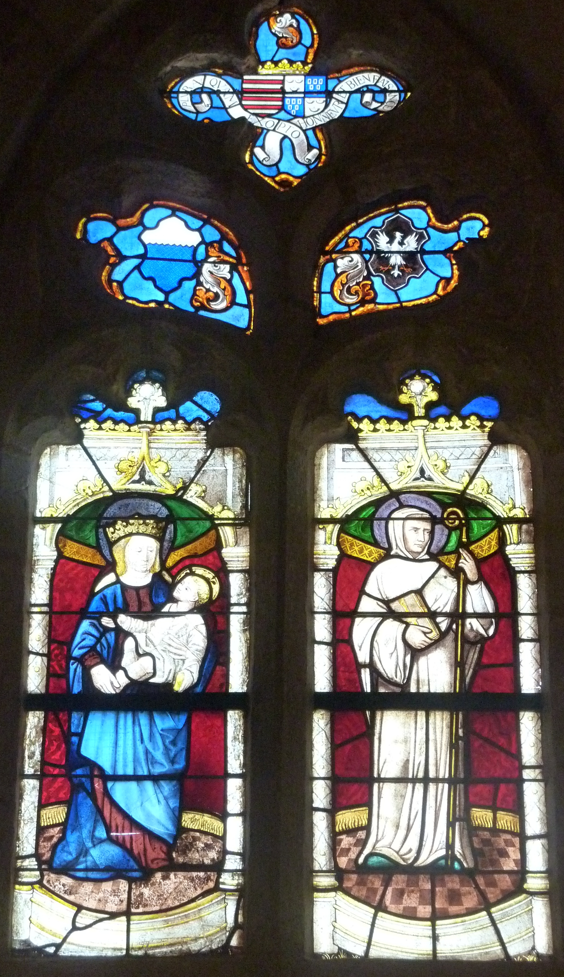 Clohars-Fouesnant : église paroissiale Saint-Hilaire, vitrail du XVIème siècle, Vierge à l'Enfant et saint Maurice